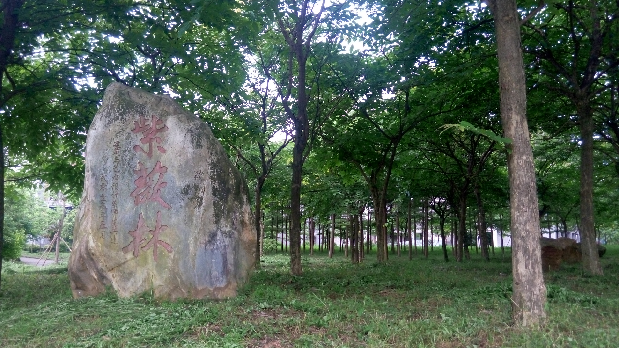 中文（中国大陆）: 广东南华工商职业学院紫薇林